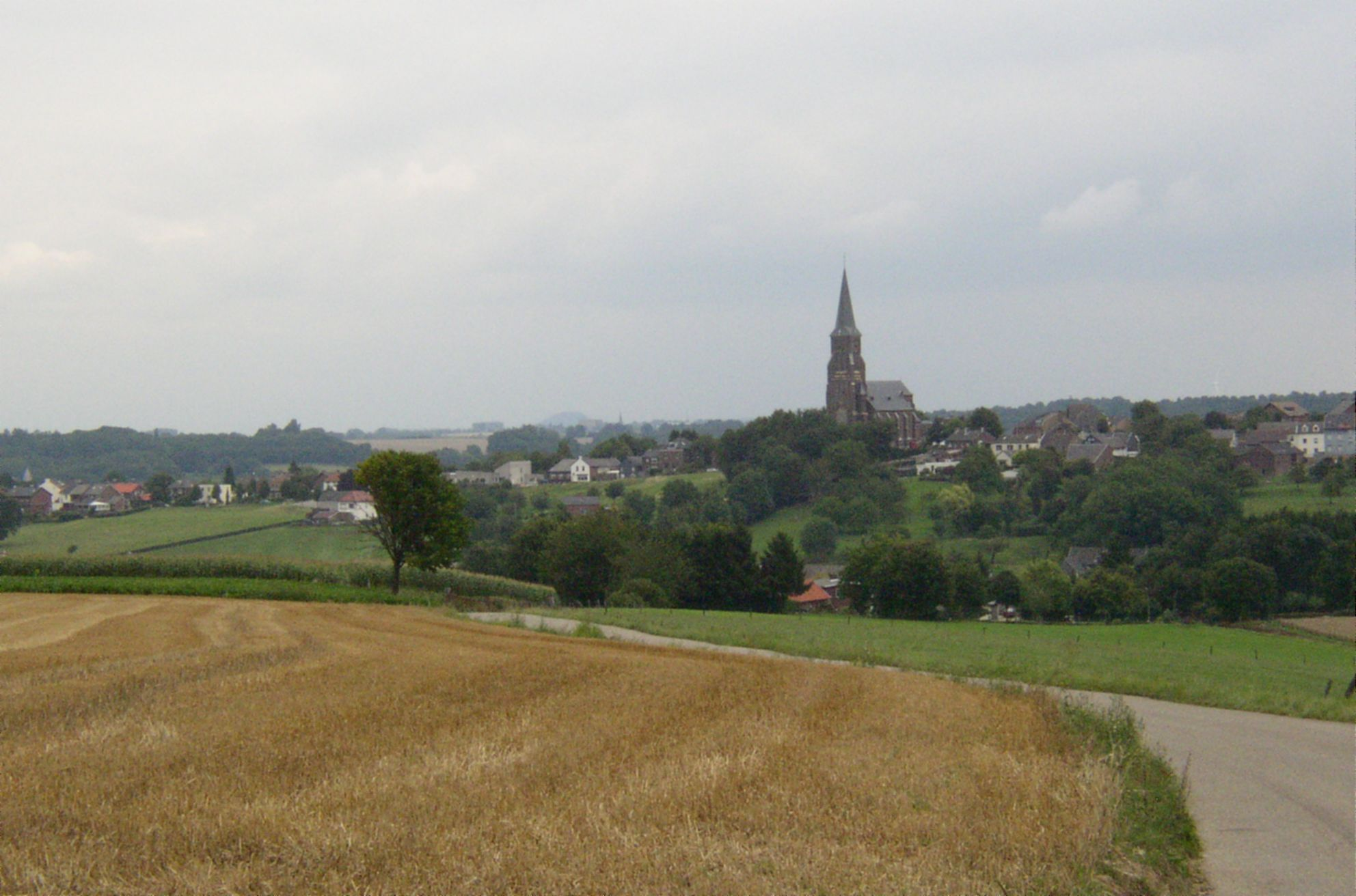 Zicht op de dorpskerk in Vijlen. De foto is genomen aan de rand van het Vijlnerbos. Foto is zelf genomen door P.G.Verhoeven met een digitale olympus camera, die het vrij gebruik van de afbeelding toestaat. Datum: augustus 2005